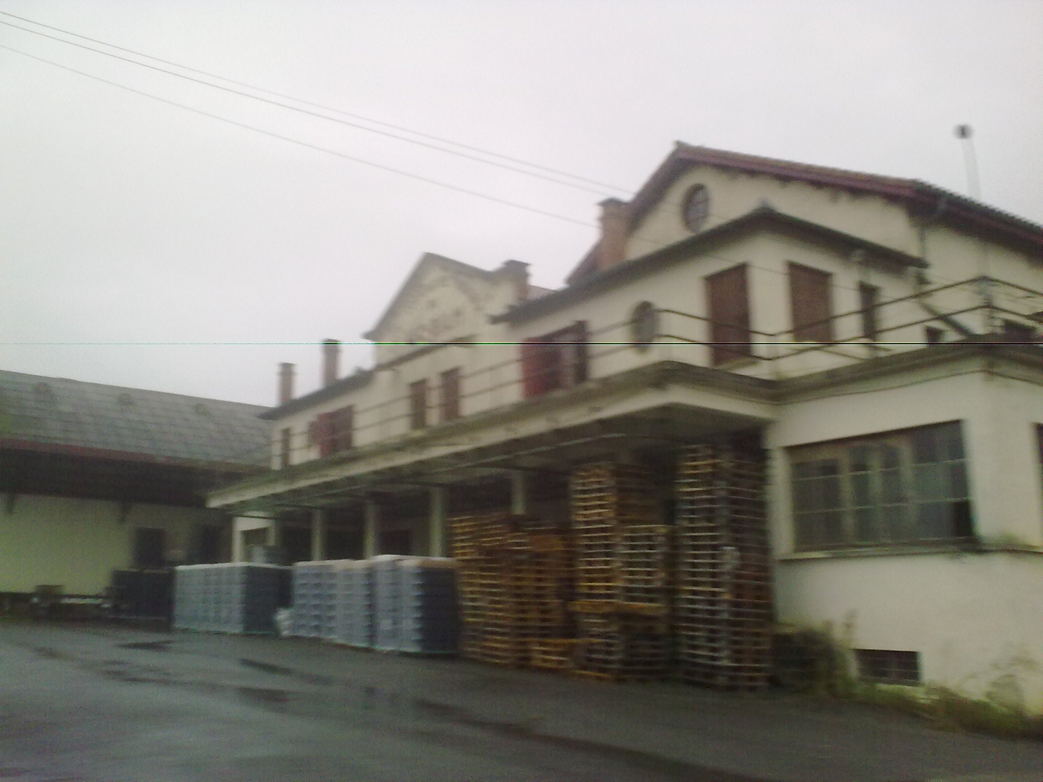 Diusse